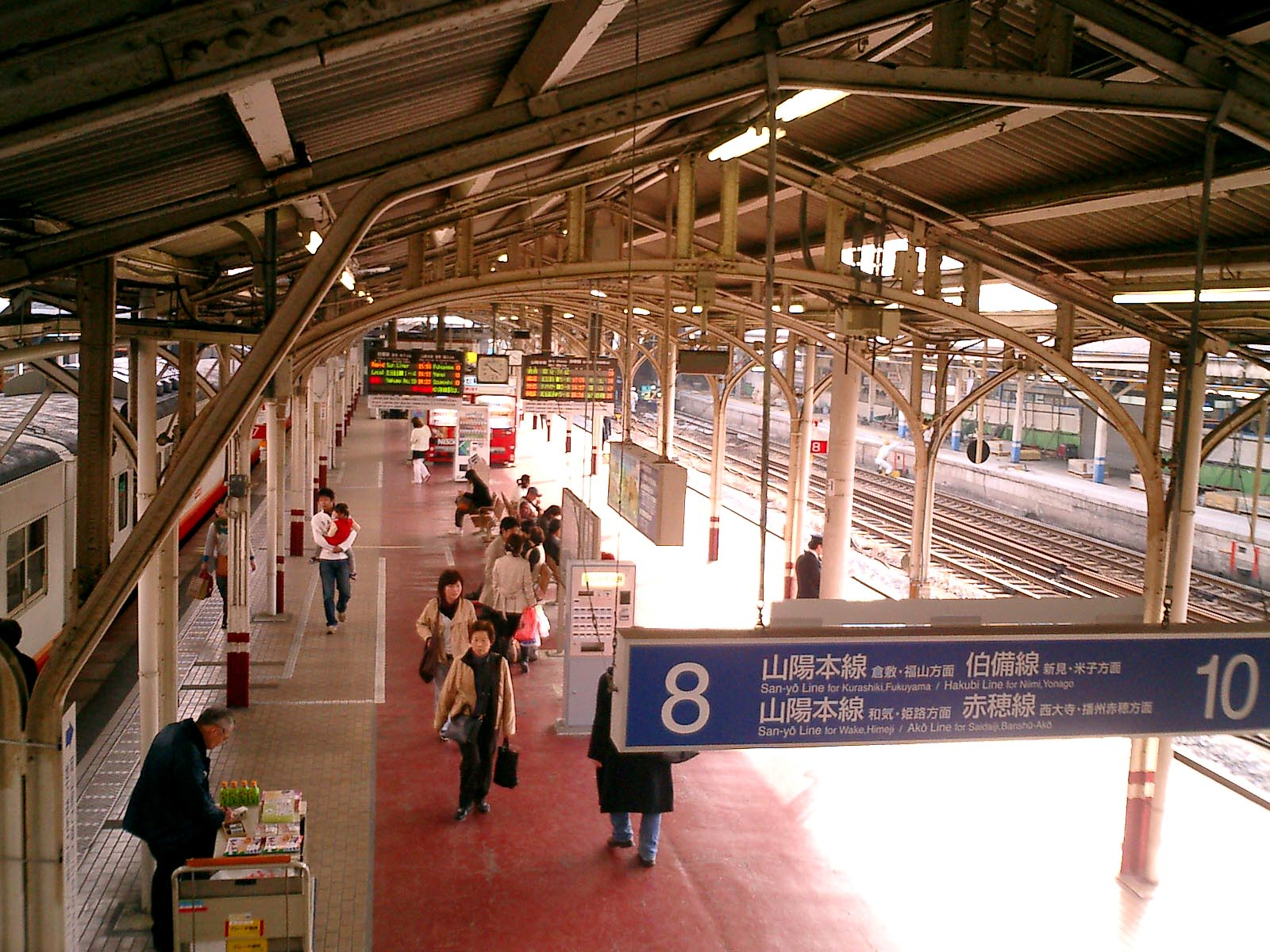 Okayama_station_platform